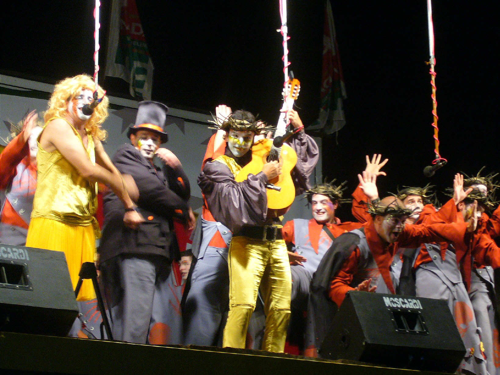 Fotografía de la murga "Curtidores de Hongos" durante el carnaval uruguayo de 2008.